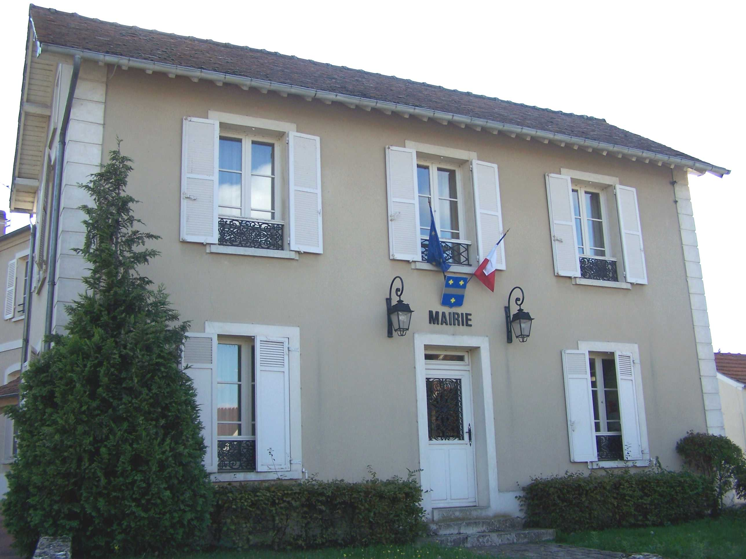 Mairie de Saint-Rémy-l'Honoré (Yvelines, France)